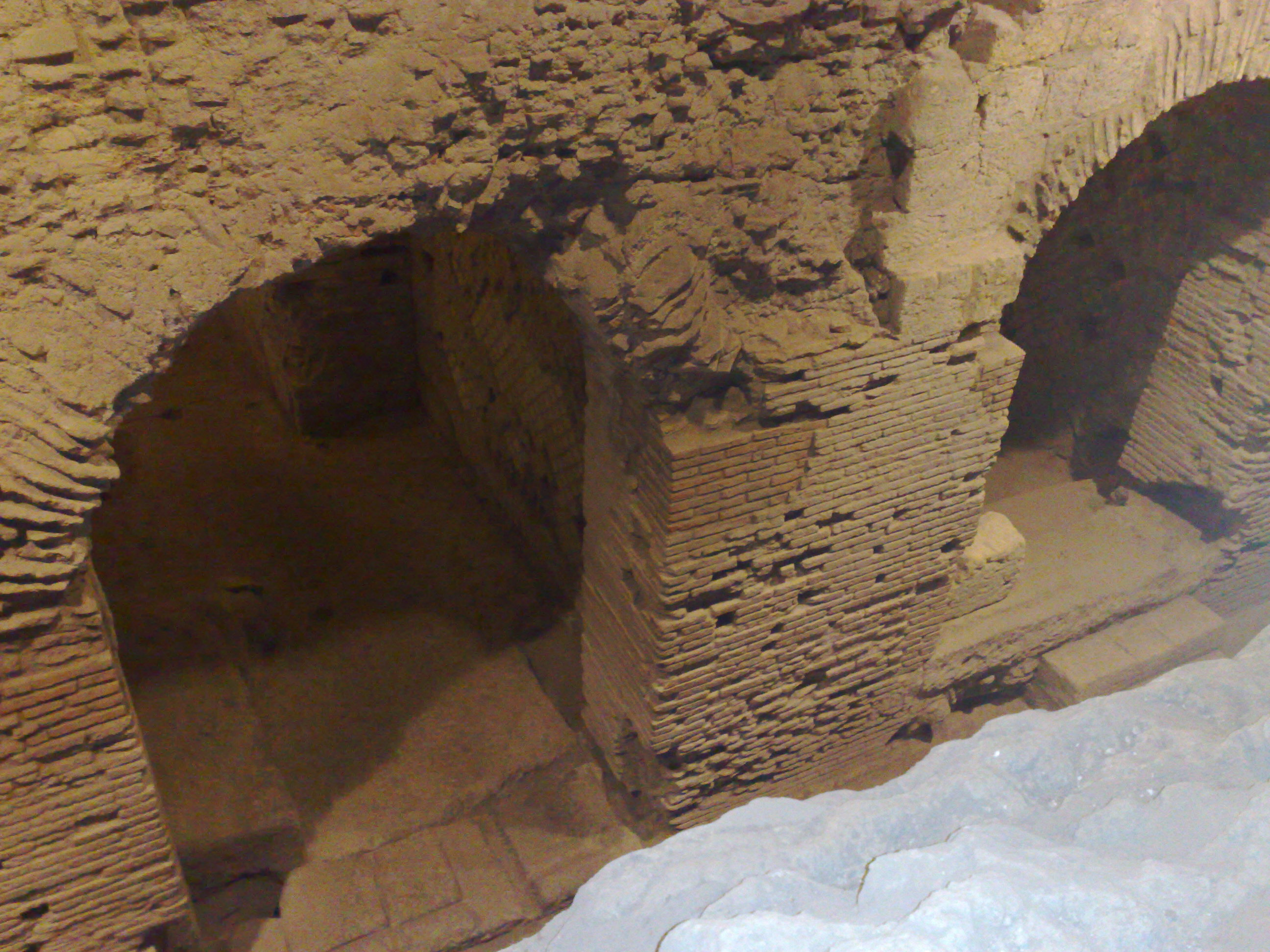 Scavi di San Lorenzo Maggiore (Napoli)